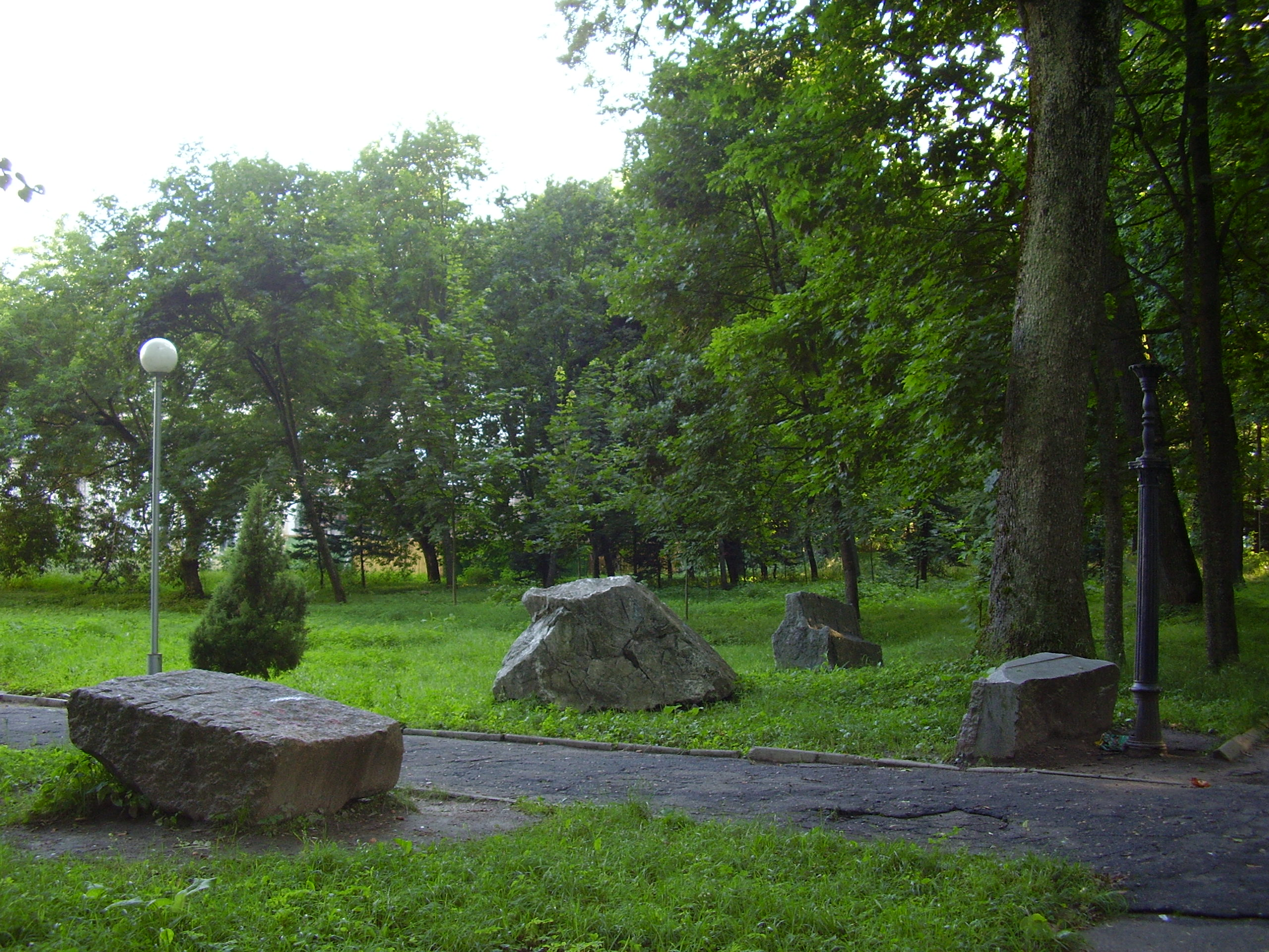 Беларуская (тарашкевіца): Палацава-паркавы ансамбль: палац з дэкаратыўным аздабленьнем інтэр’еру (ляпны дэкор, камін і печ, падлога з меандравым арнамантам, плафоны столі), гаспадарчыя пабудовы, парк. в. Жылічы This is a photo of Belarusian heritage monument. Reference number: 512Г000459 ( WLM)